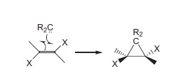 Estereoquímica de reação de carbenos singletos